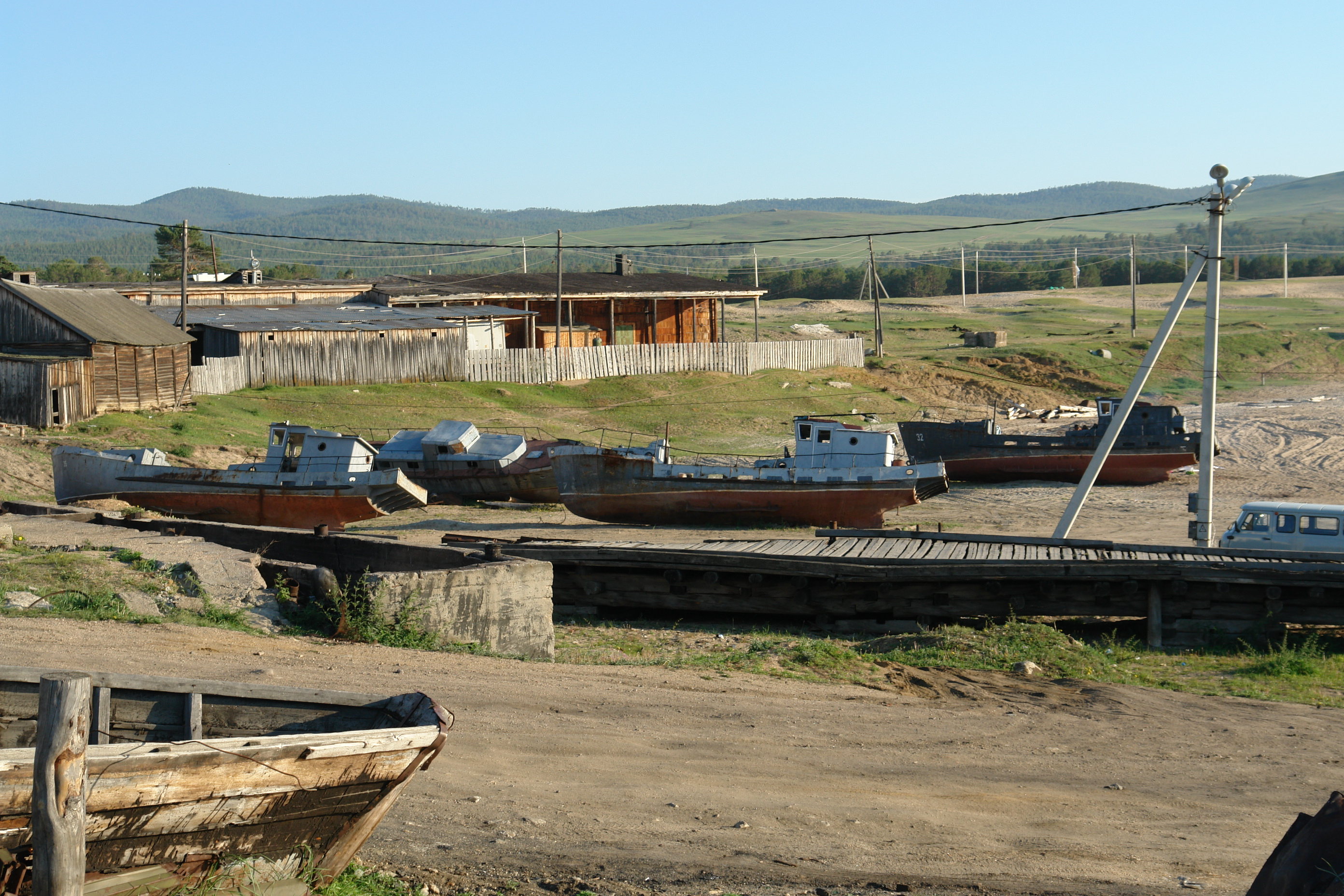 Кладбище кораблей около бывшего ММРЗ в Хужире